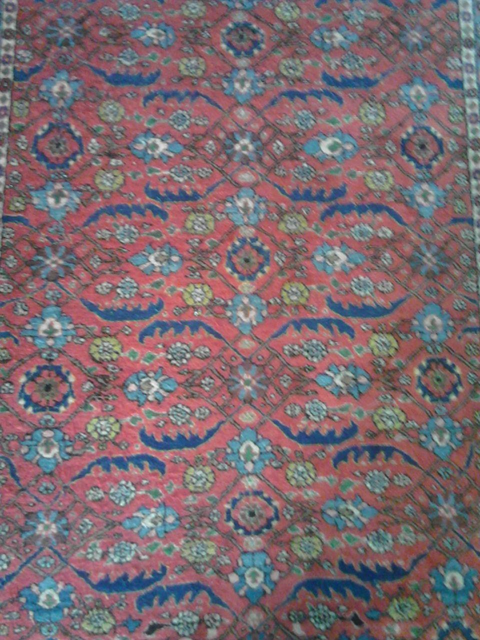 فرش دستباف بافته شده توسط معصومه هرندی ساکن روستای حصارحسن بیگ